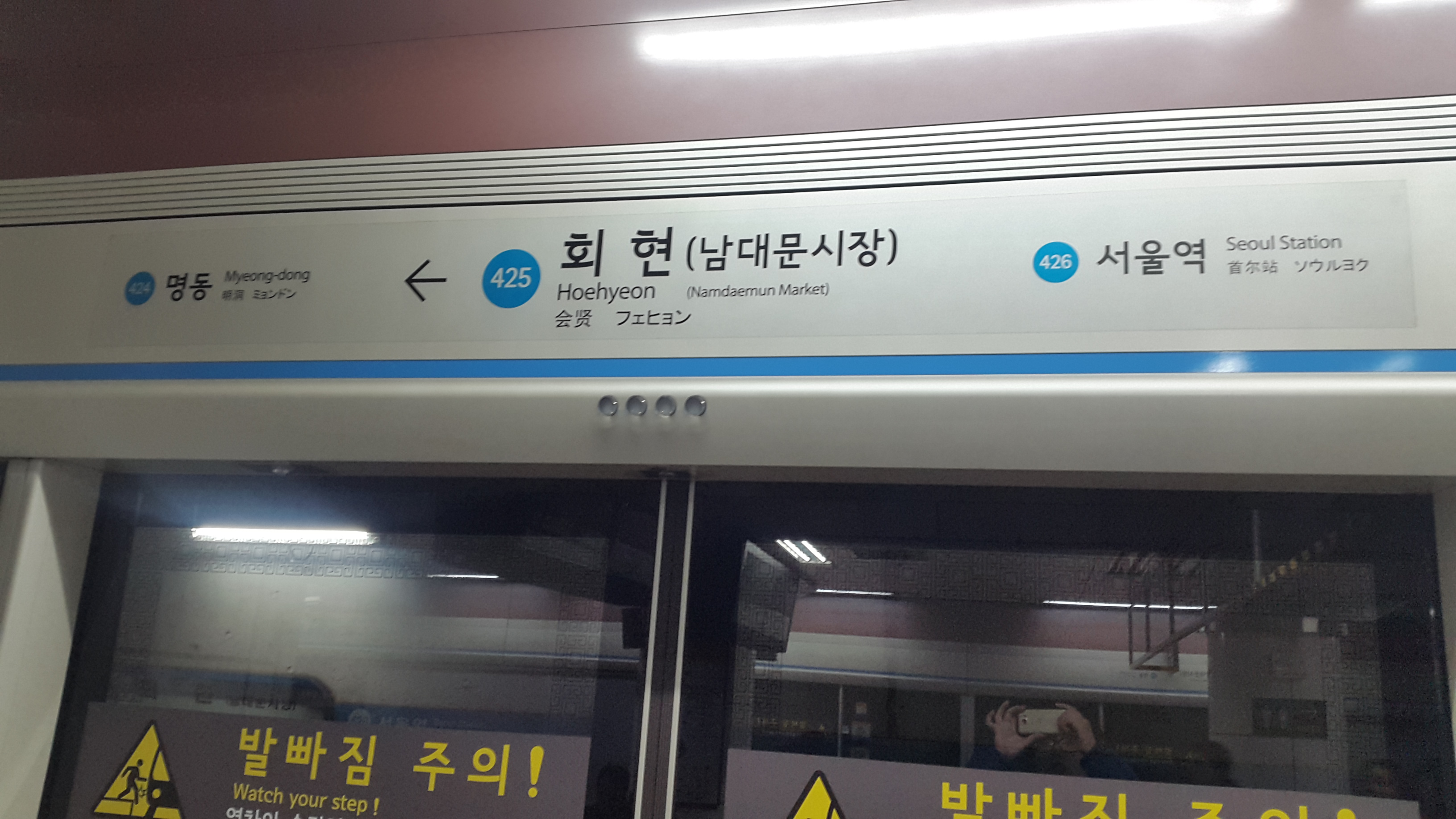 회현역 서울남산체 2